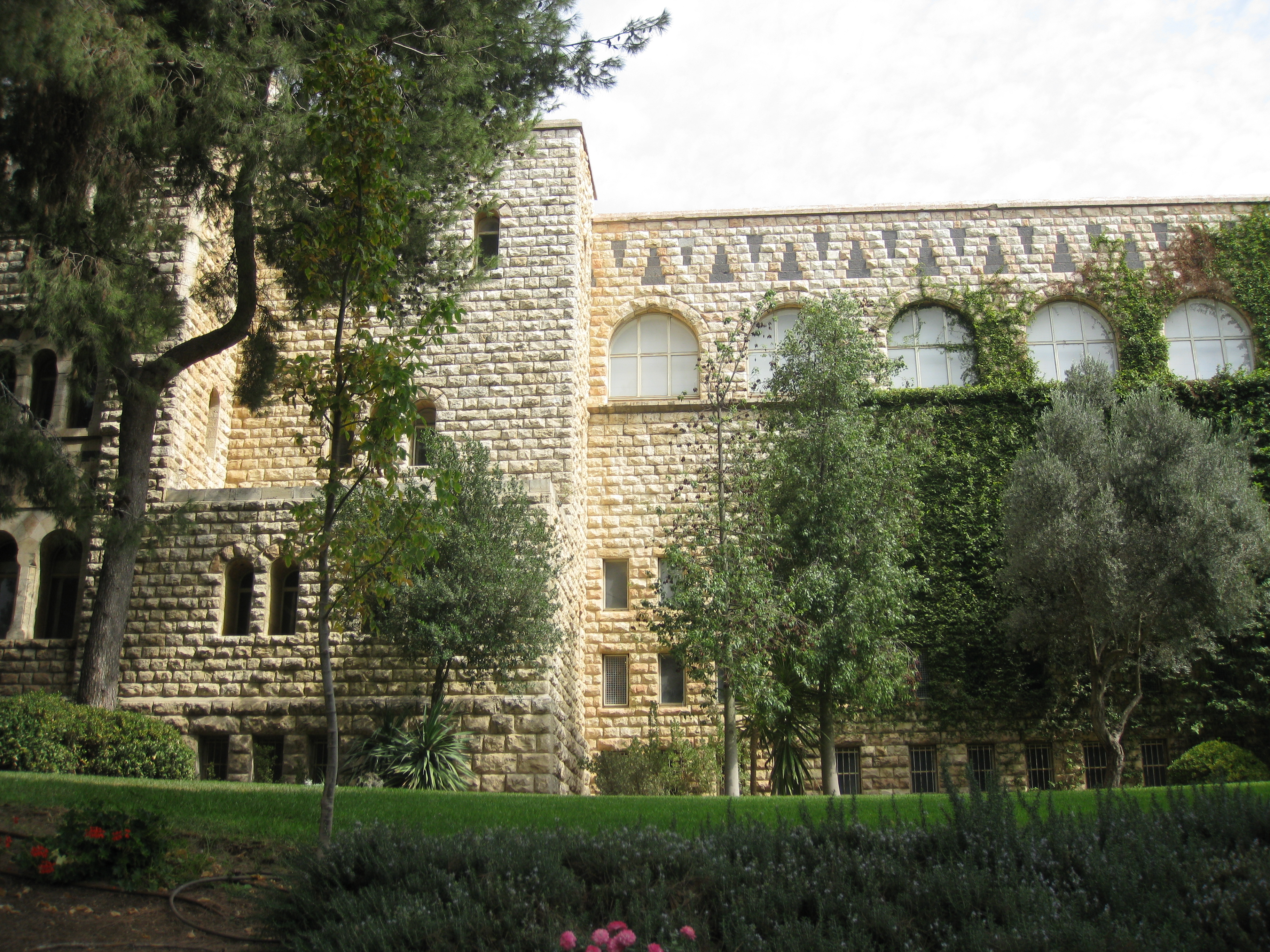 Mount Scopus הר הצופים